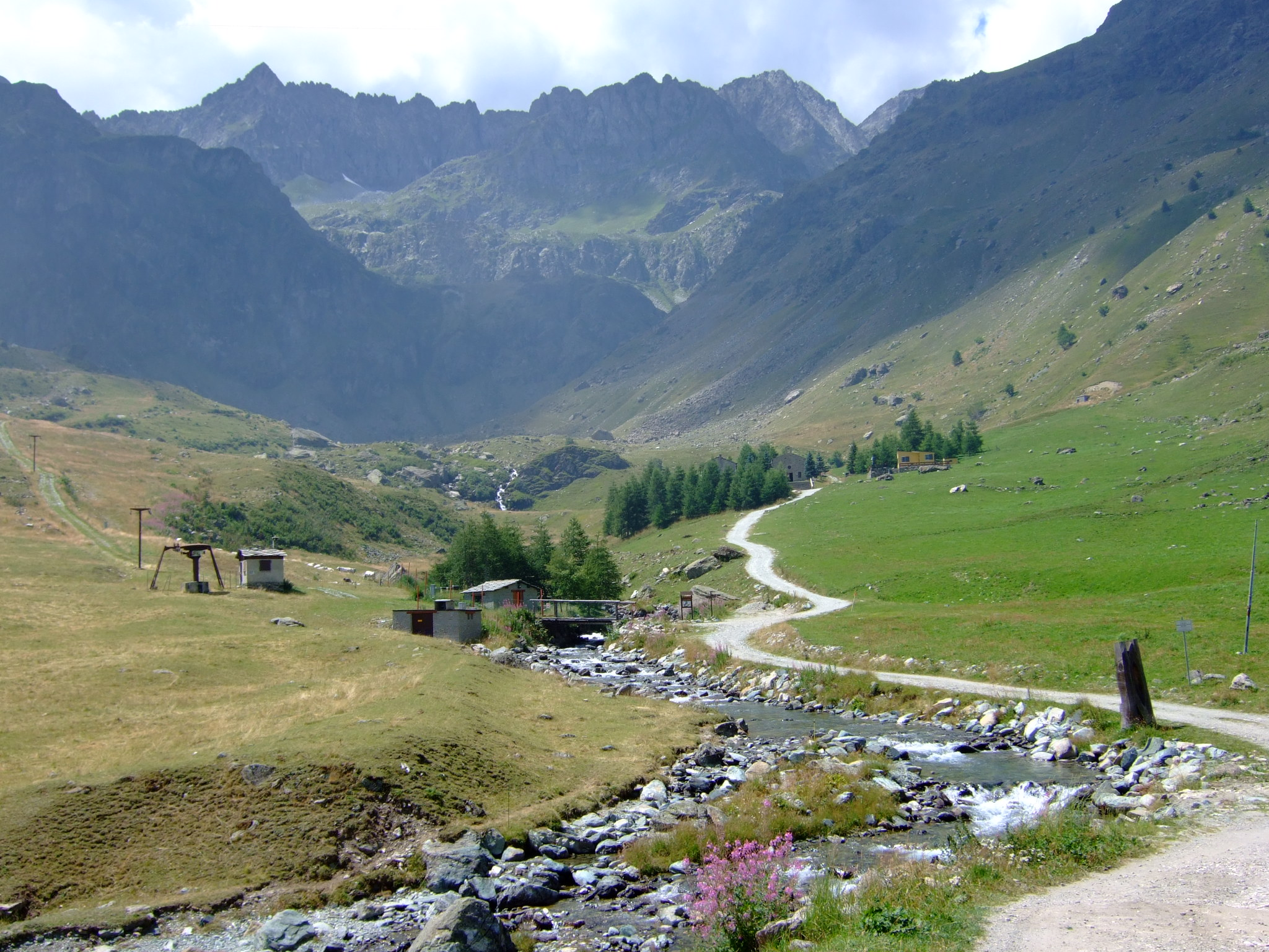 Le Pô naissant au-dessus de Crissolo